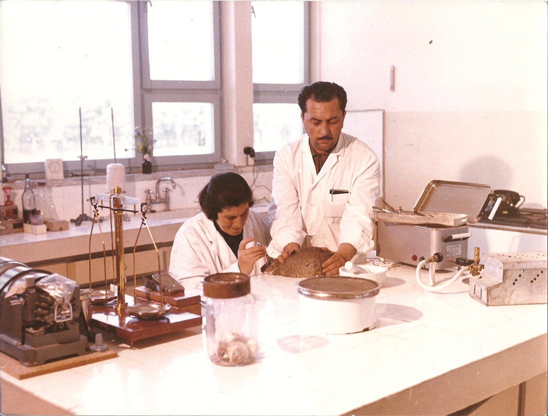 Two veterinarians at work